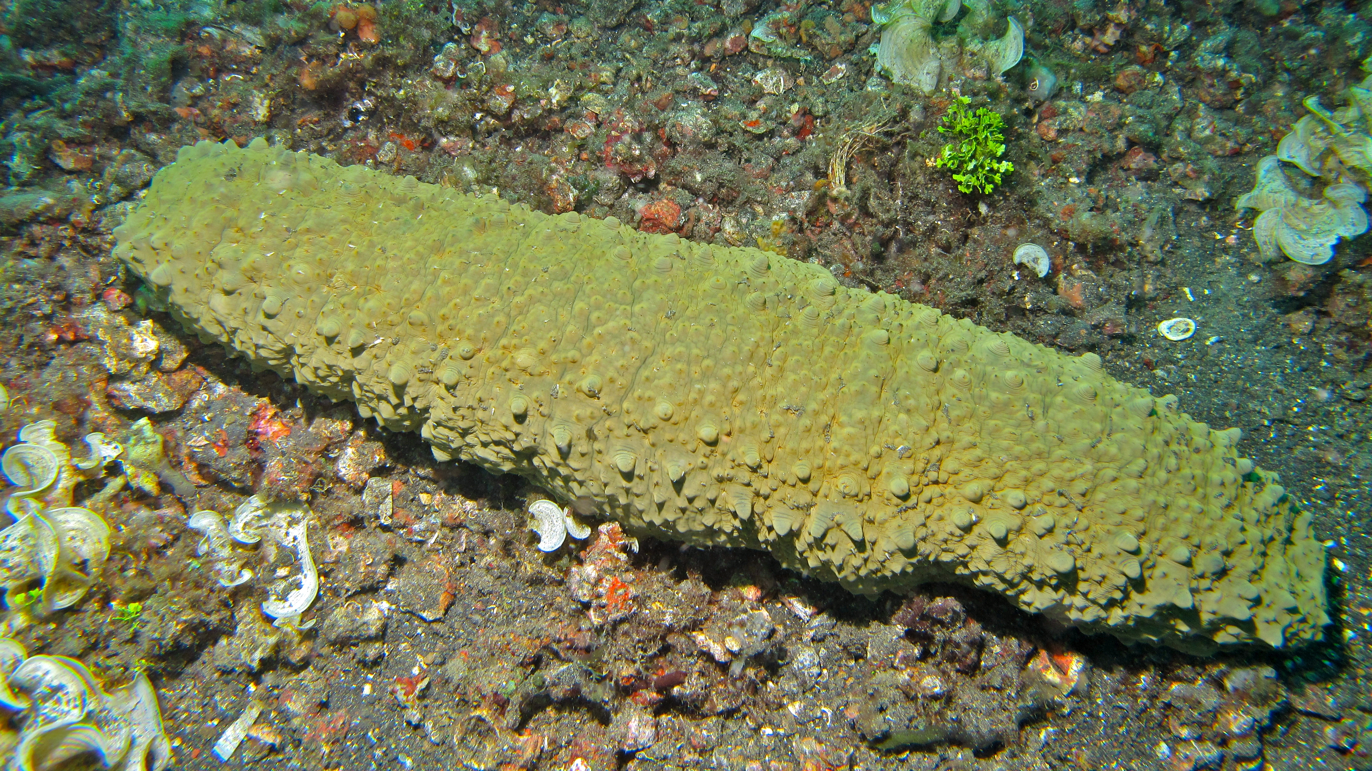 Jahir, Lembeh Strait, Sulawesi, INDONESIA